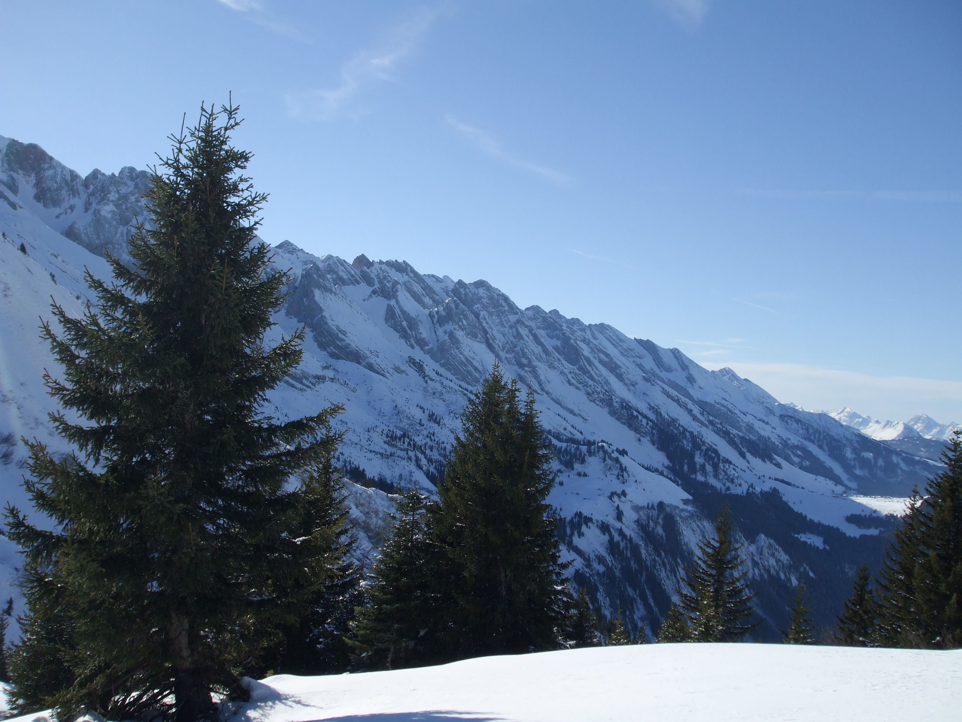 La Chaîne des Aravis, avec Picea abies